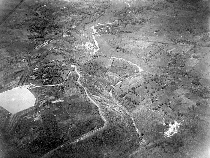 Repronegatief. Waterkrachtwerk Bengkok aan de Tji Kampoendoeng